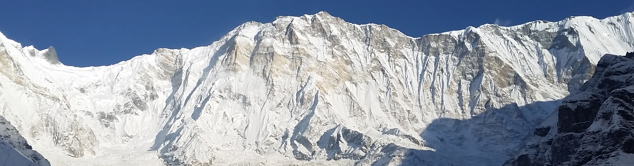 Панорама масиву Анапурна I (південна стіна): Аннапурна I (в центрі, ліворуч), Аннапурна I Центральна (в центрі), Аннапурна I Східна (в центрі, праворуч)